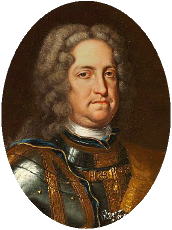 Gemälde von Kaiser Karl VI.